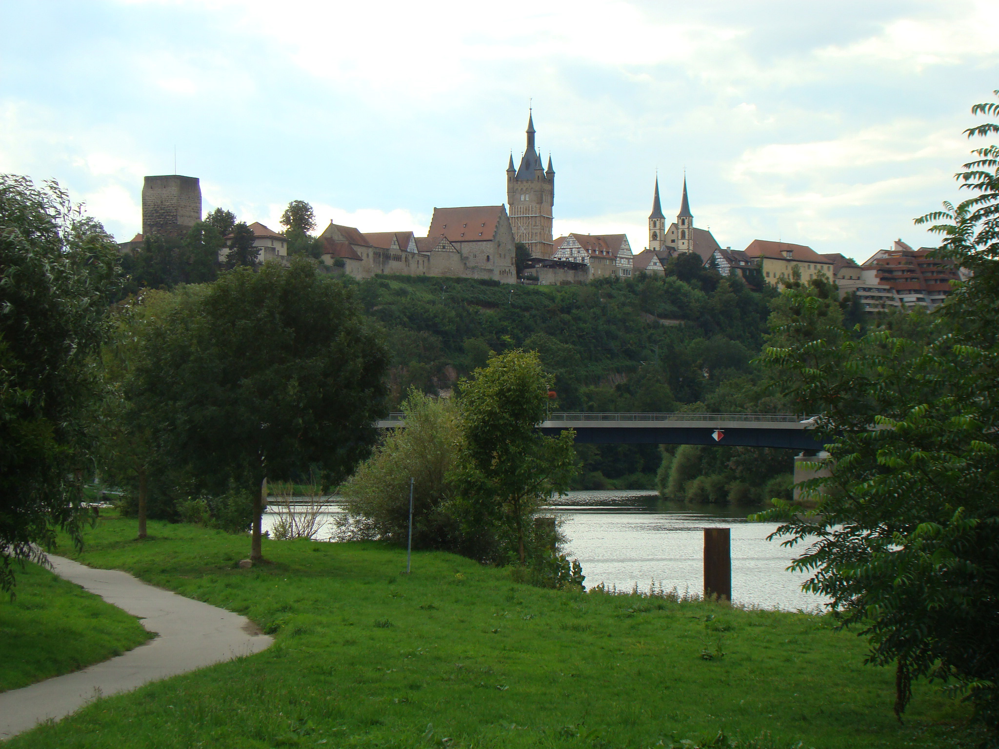 Bad Wimpfen, die Stauferpfalz vom Neckarufer aus gesehen